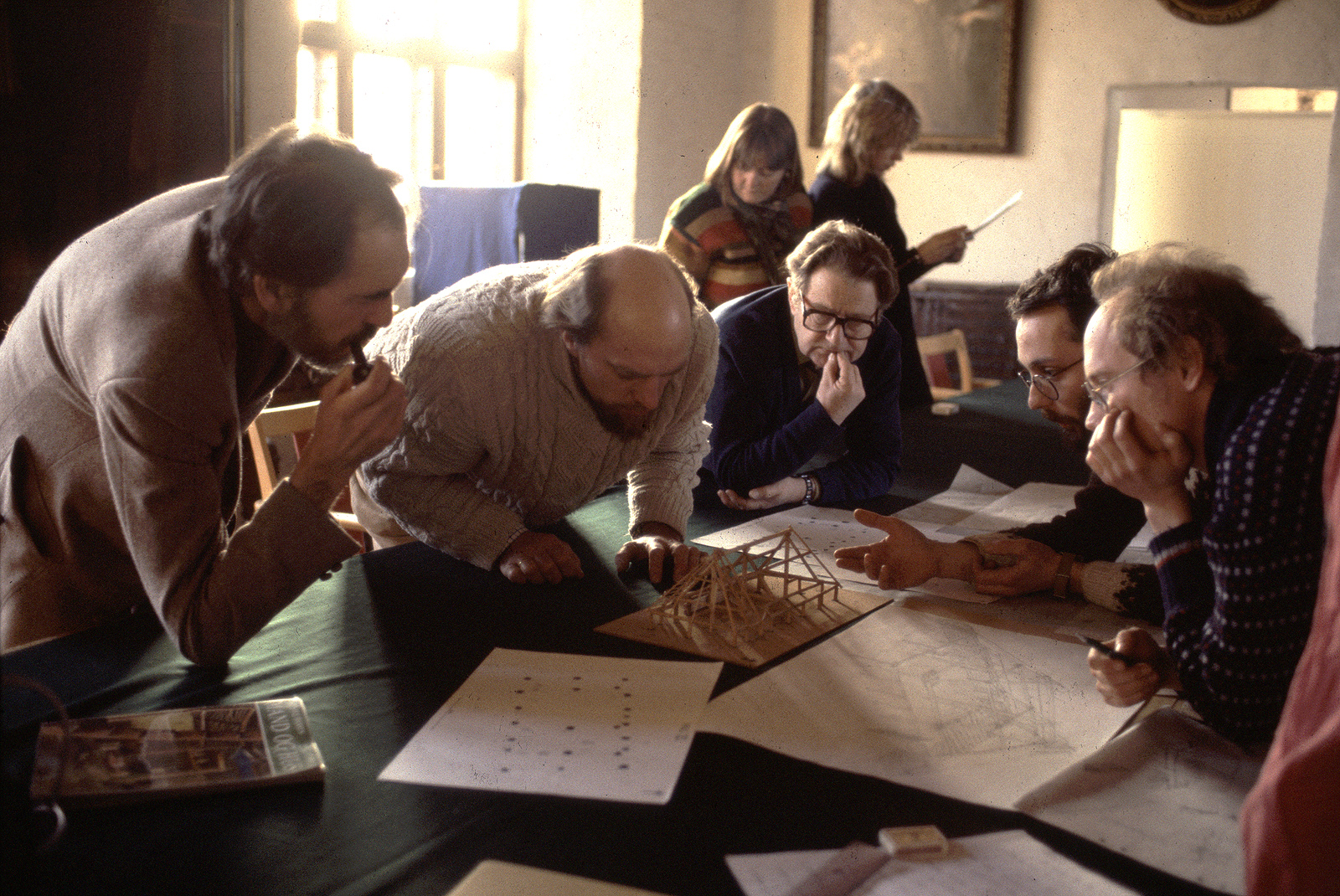 Stenåldersprojektet Forntid i Nutid i Skånes djurpark, Sverige